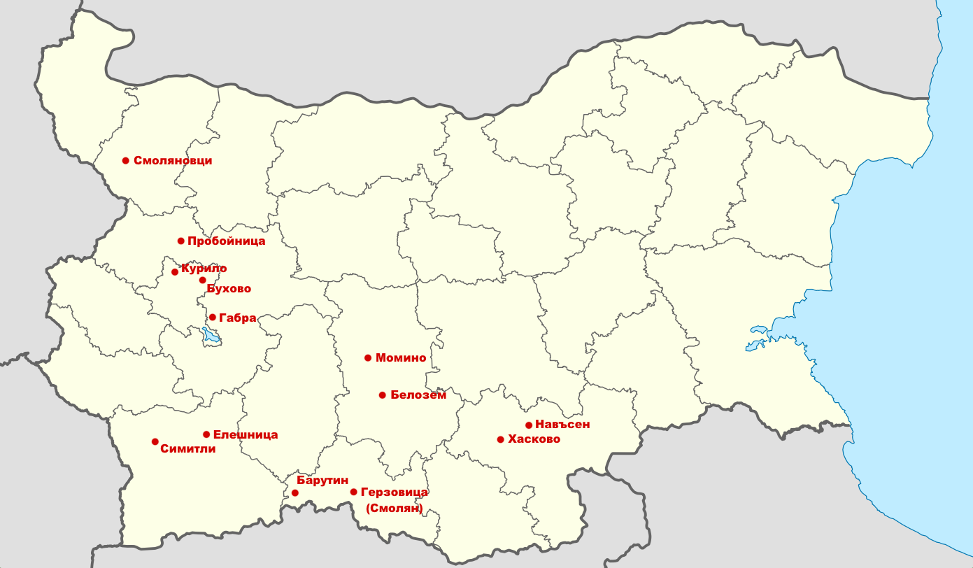 Добив на уран в България